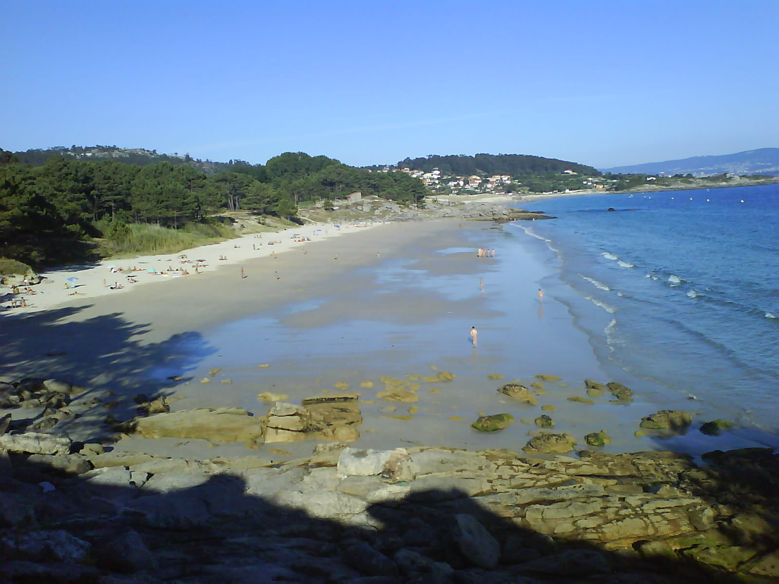 Cangas do Morrazo, playa de Viño. Pontevedra Galicia España.